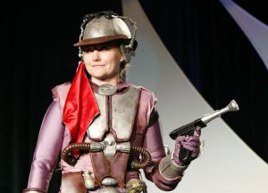 Zam Wesell cropped